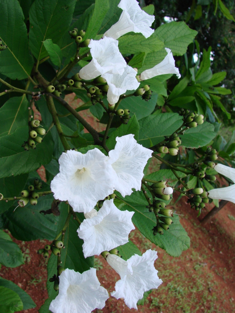 Cordia superba - BORAGINACEAE Jardim Botânico de Brasília - Distrito Federal - Brasil.